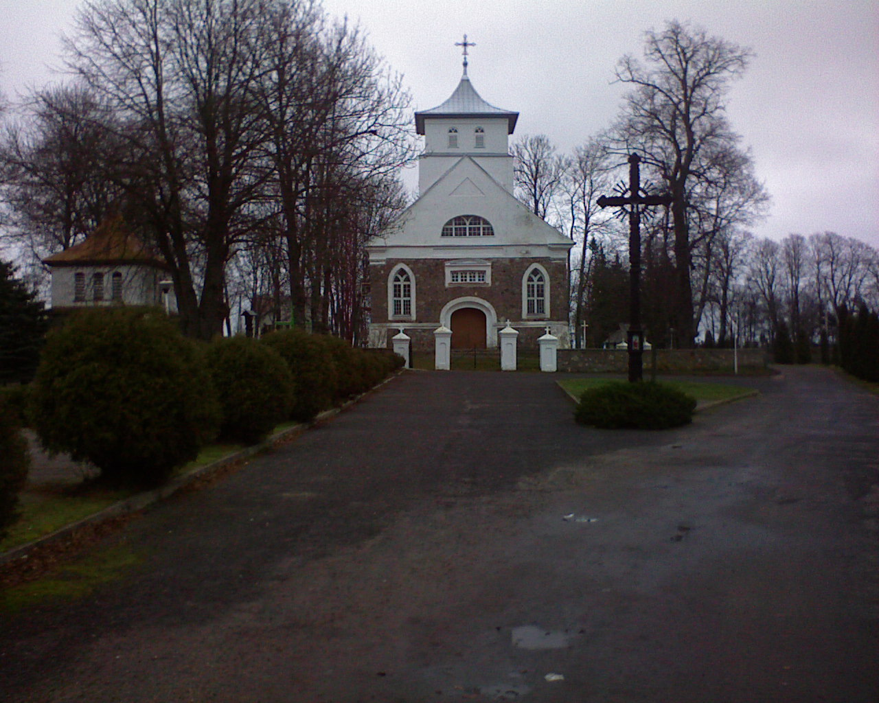 Lenkimų Šv. Onos bažnyčia Autorius: Tadas12, 2006-12-26